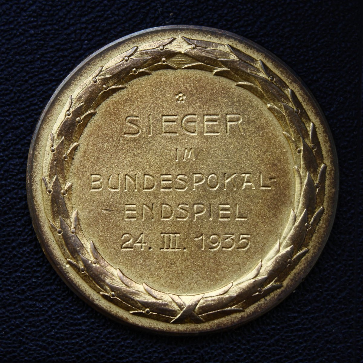 Bundespokalsieger 1935 Gau Mitte gegen Brandenburg 2:0